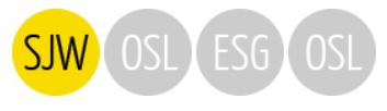 Logo Schweizerisches Jugendschriftenwerk, Zürich, Schweiz